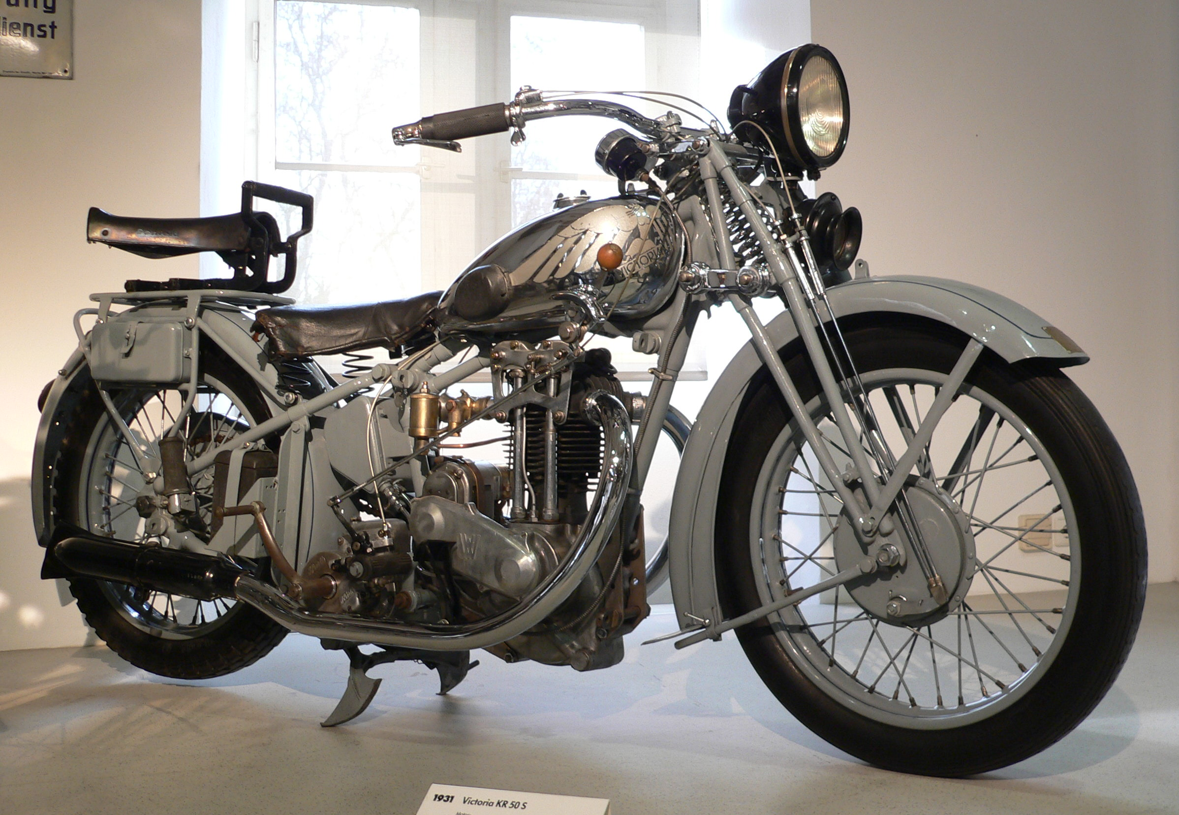 Motorbike "Victoria KR 50 S" (1931) at the Deutsches Zweirad- und NSU-Museum (495 cm³, 18 PS bei 5.000 U/min., 110 km/h)